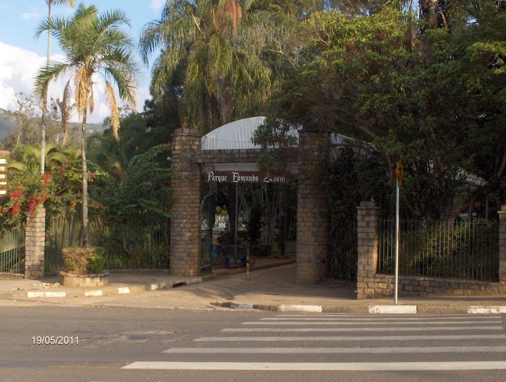 Fotografia da entrada principal do Parque Edmundo Zanoni (parque municipal de Atibaia), onde ocorre anualmente a famosa Festa das Flores e Morangos de Atibaia.